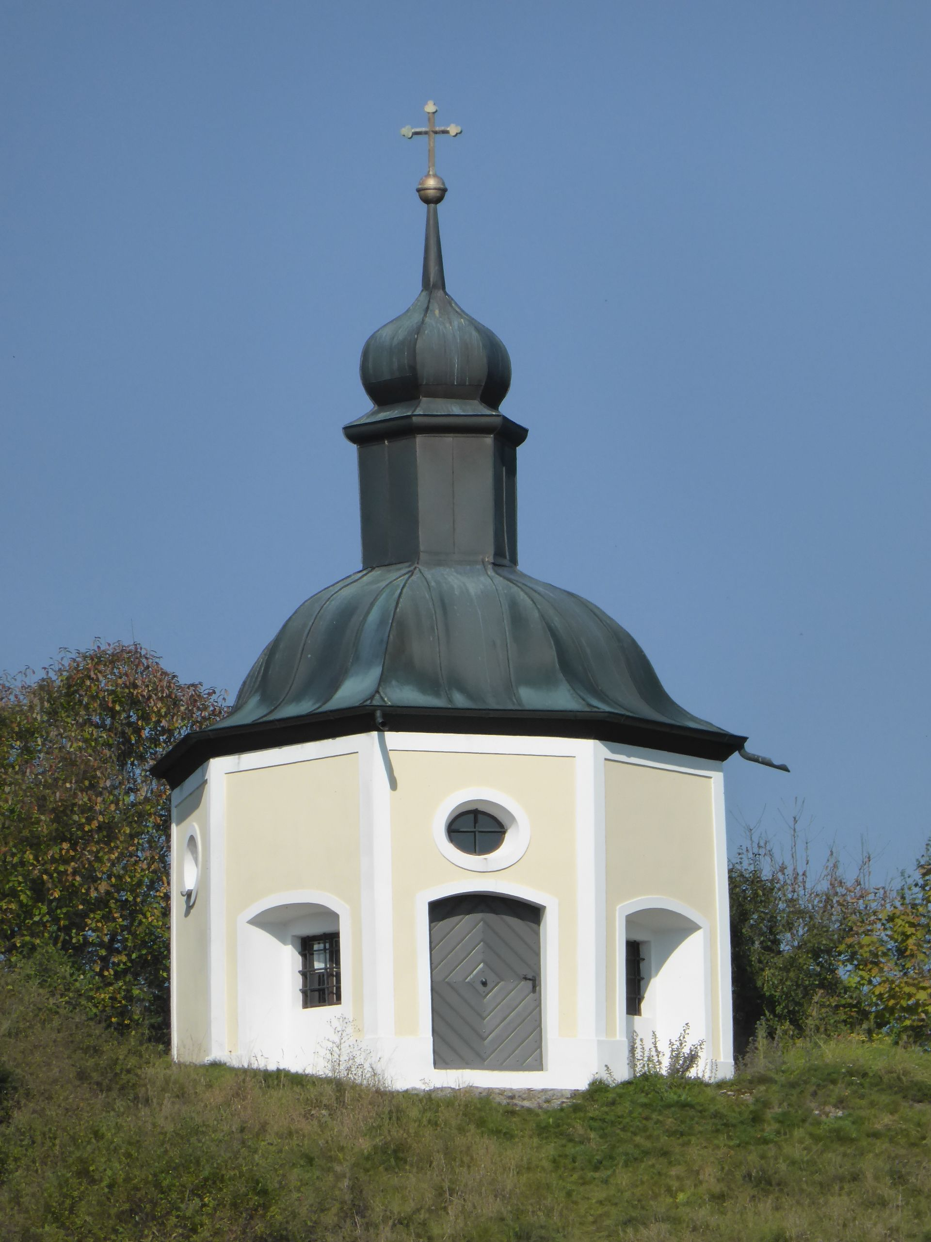 Kapelle St. Johannes Nepomuk auf dem Blümelberg